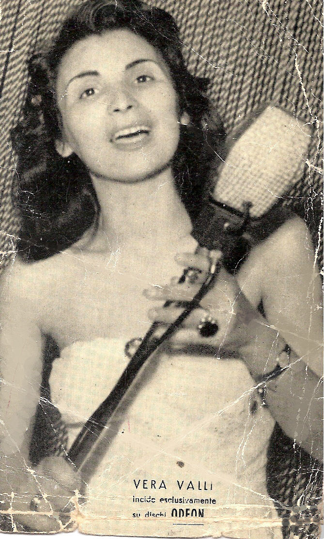 La cantante Vera Valli